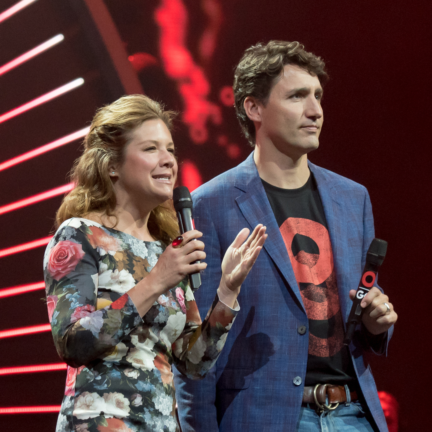 Justin und Sophie Trudeau beim Clobal Citizen Festival in Hamburg